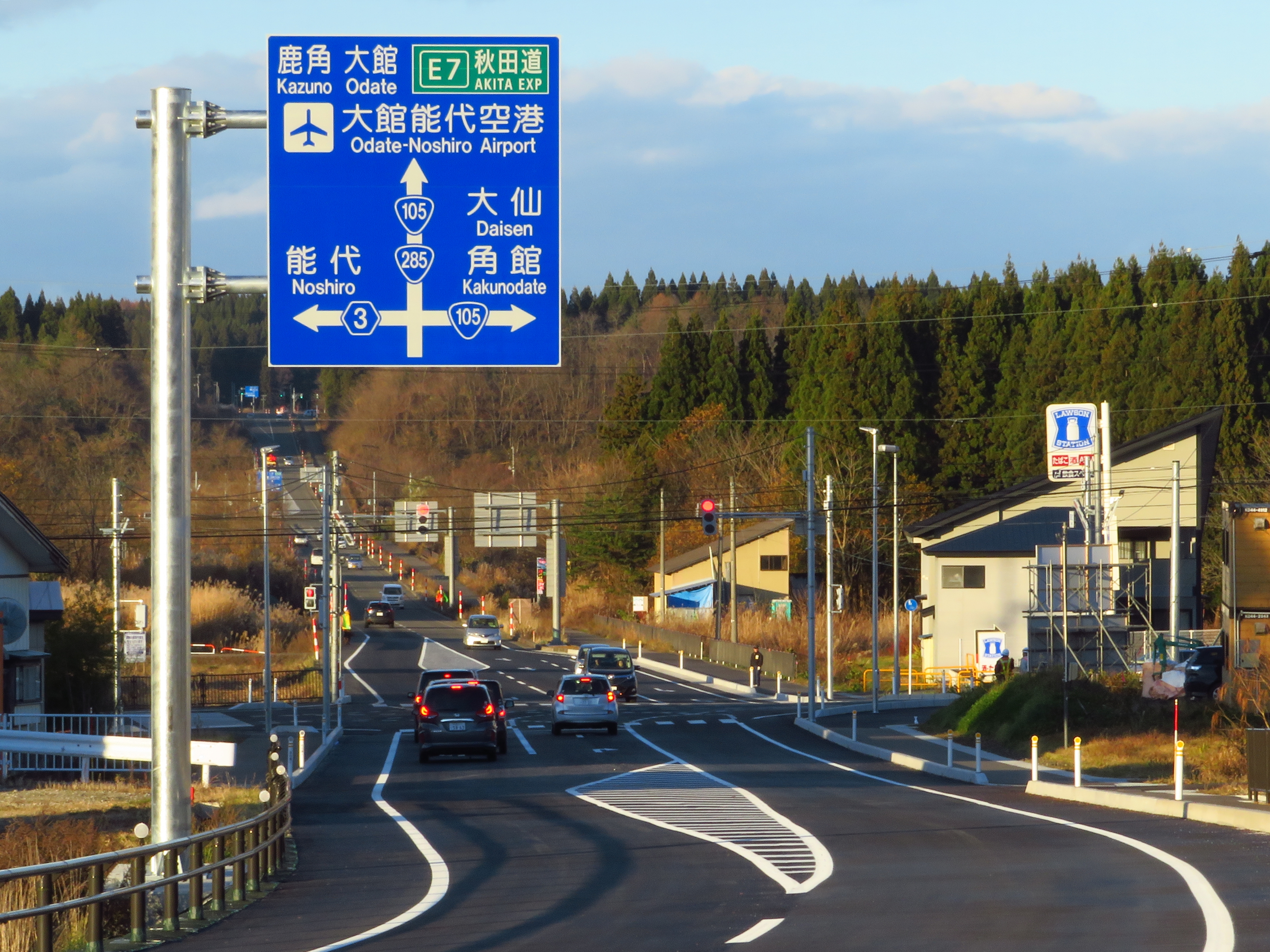 国道285号「滝ノ沢バイパス」終点の諏訪岱交差点付近：秋田県北秋田市米内沢 Canon PowerShot SX720 HS